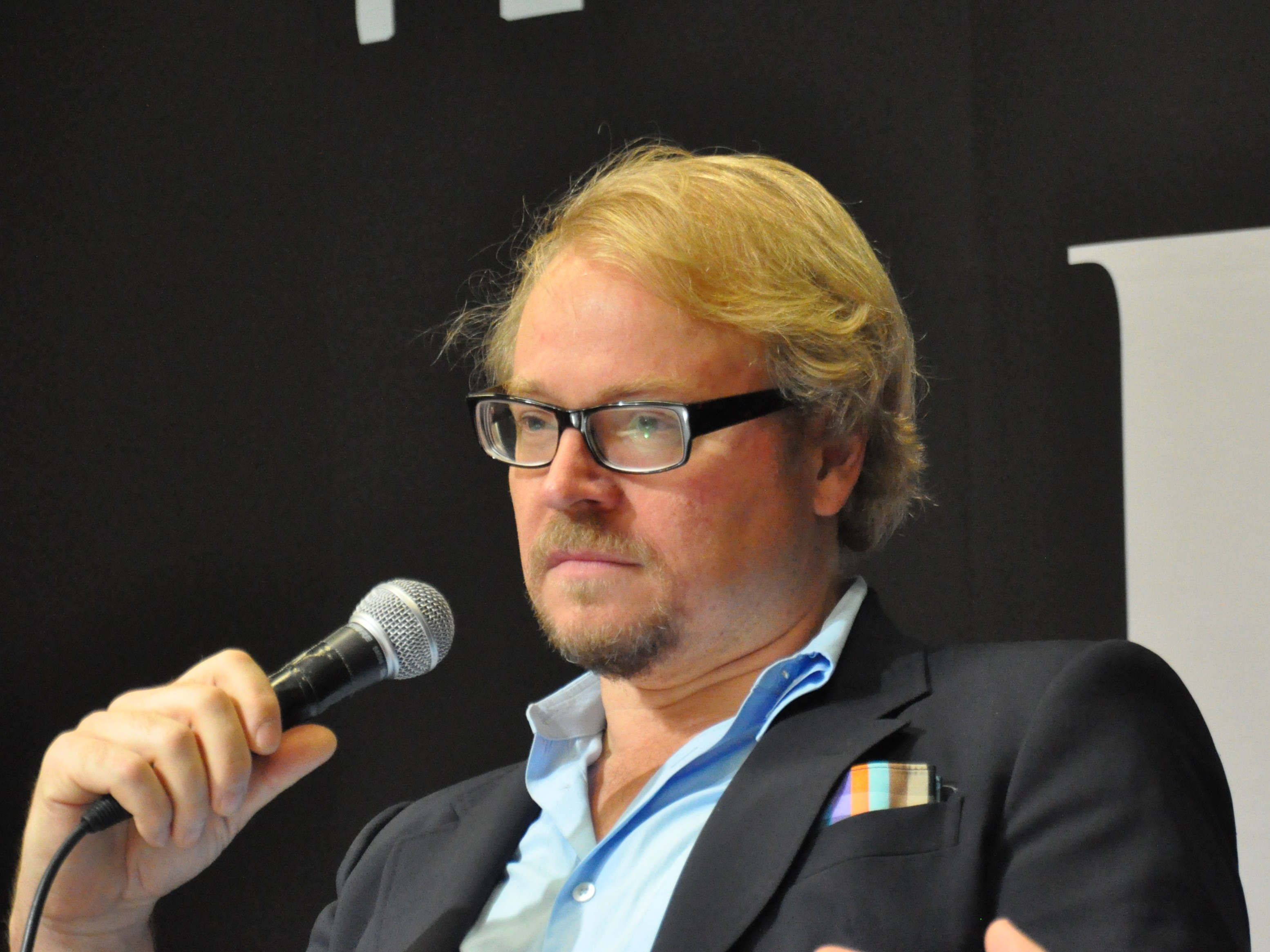 Fredrik Lindström på Bokmässan i Göteborg 2011